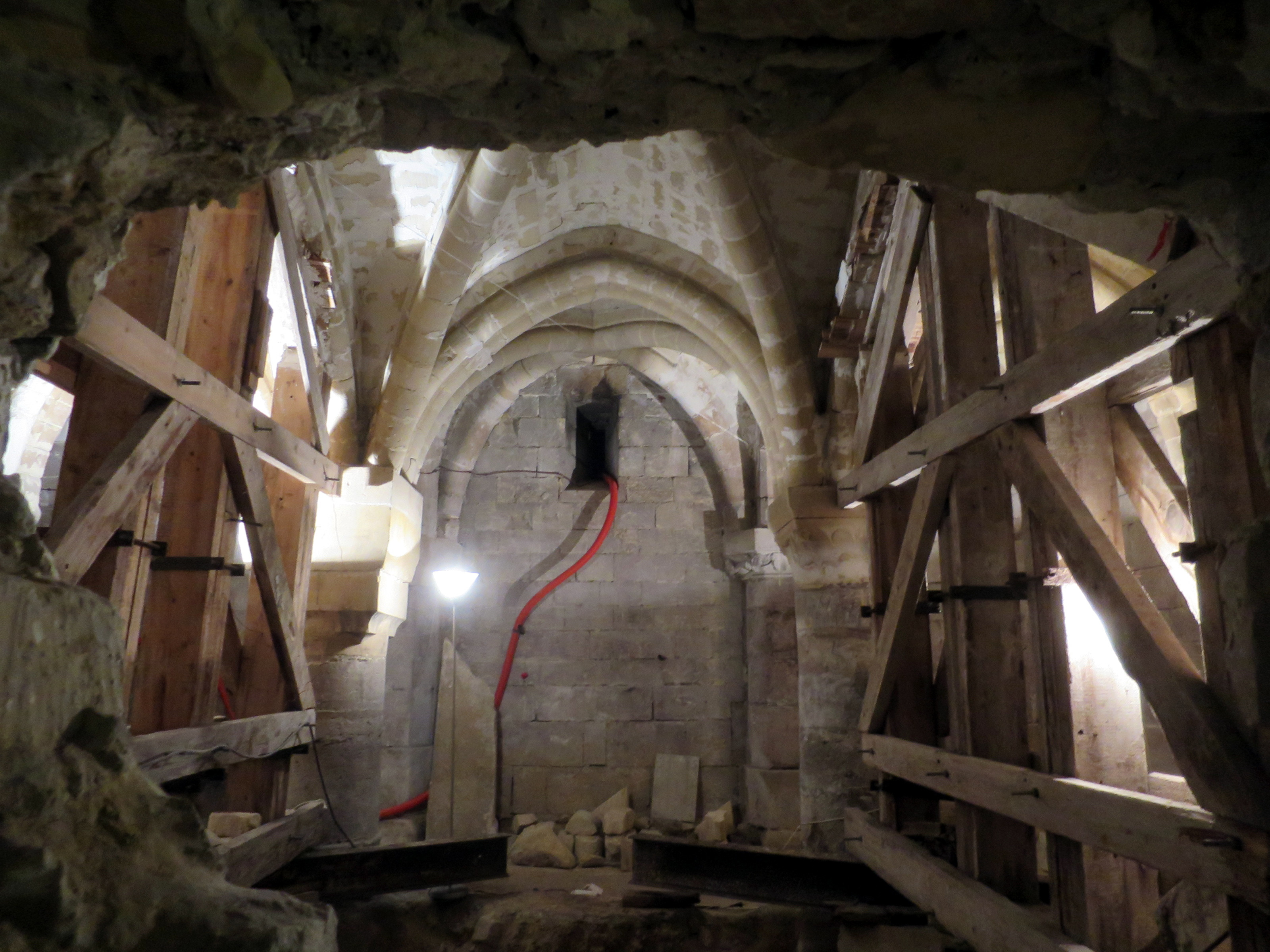 crypte de l'église Saint-Martin à Cormeilles-en-Parisis.